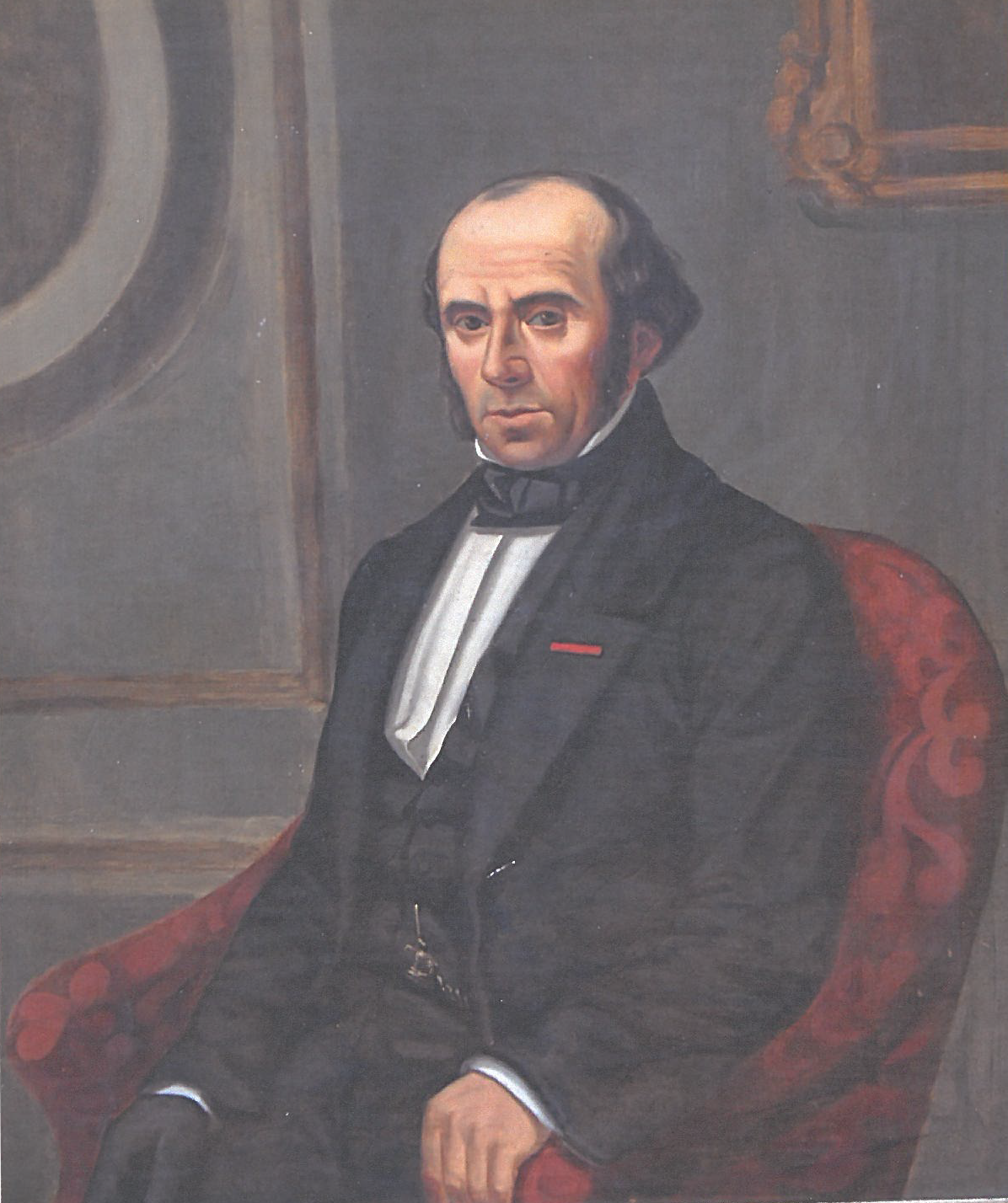 Antoîne Mage-Aîné (circa 1860)